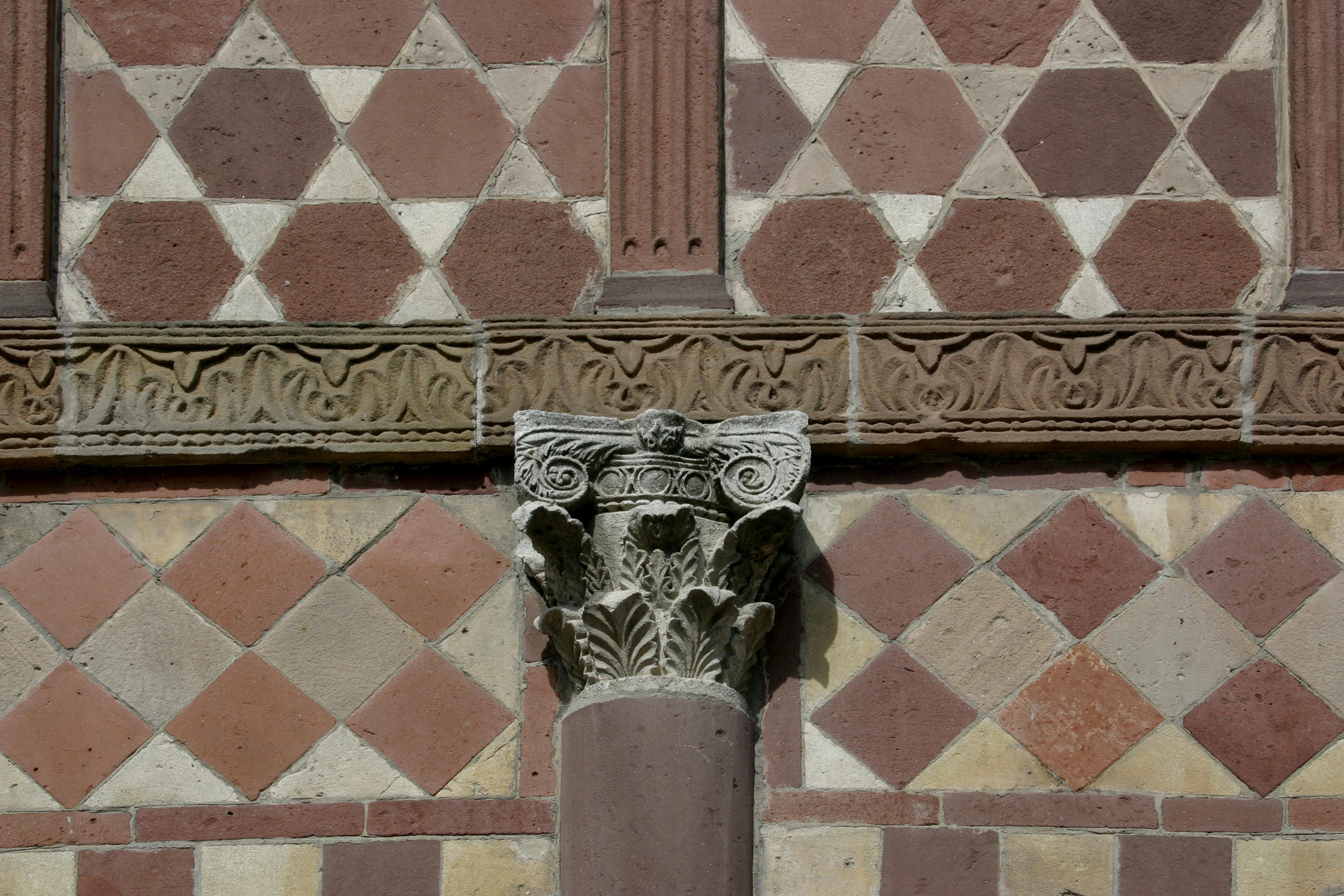 Karolingische Torhalle in Lorsch.